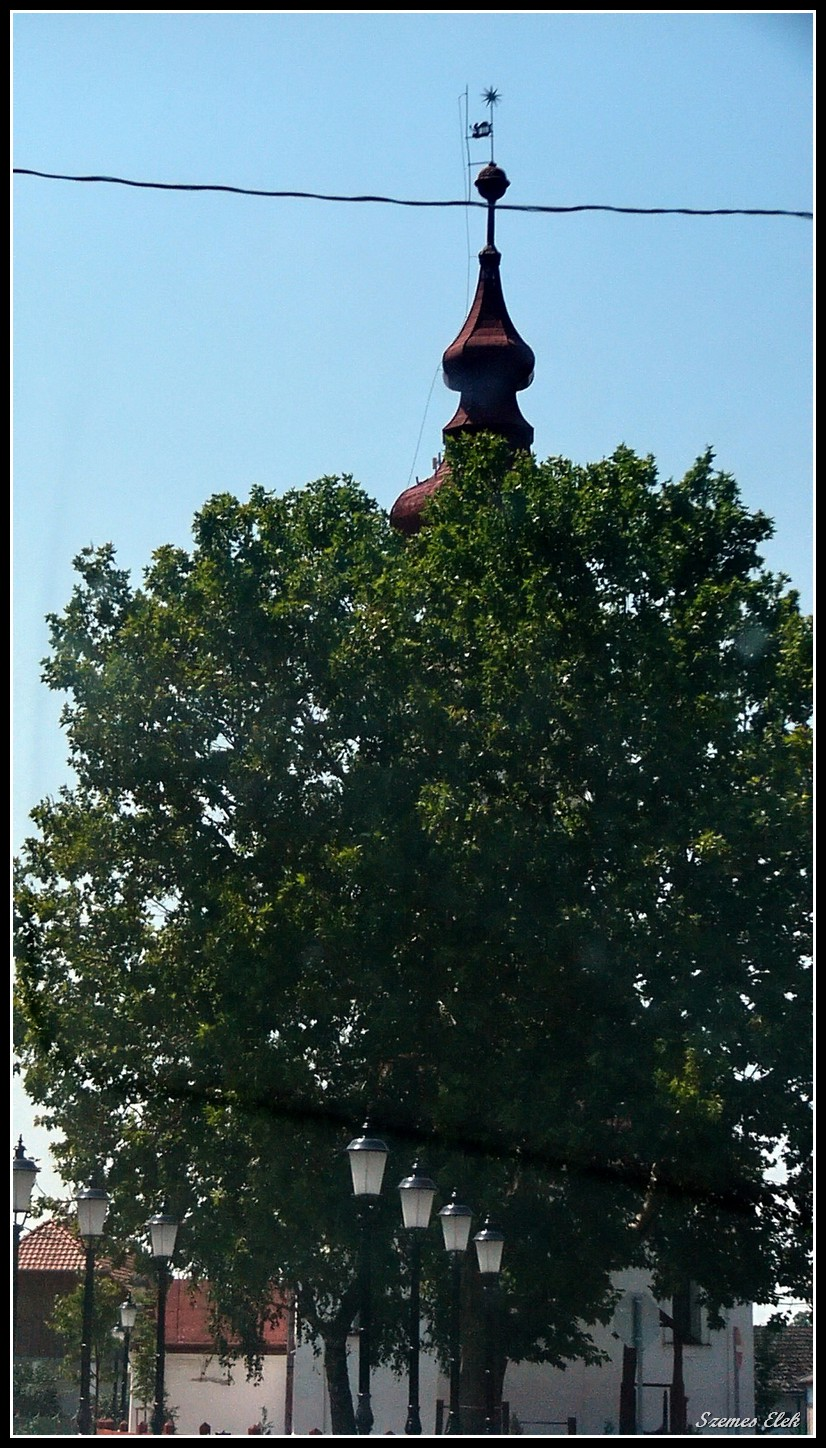 Kömörő, Hungary